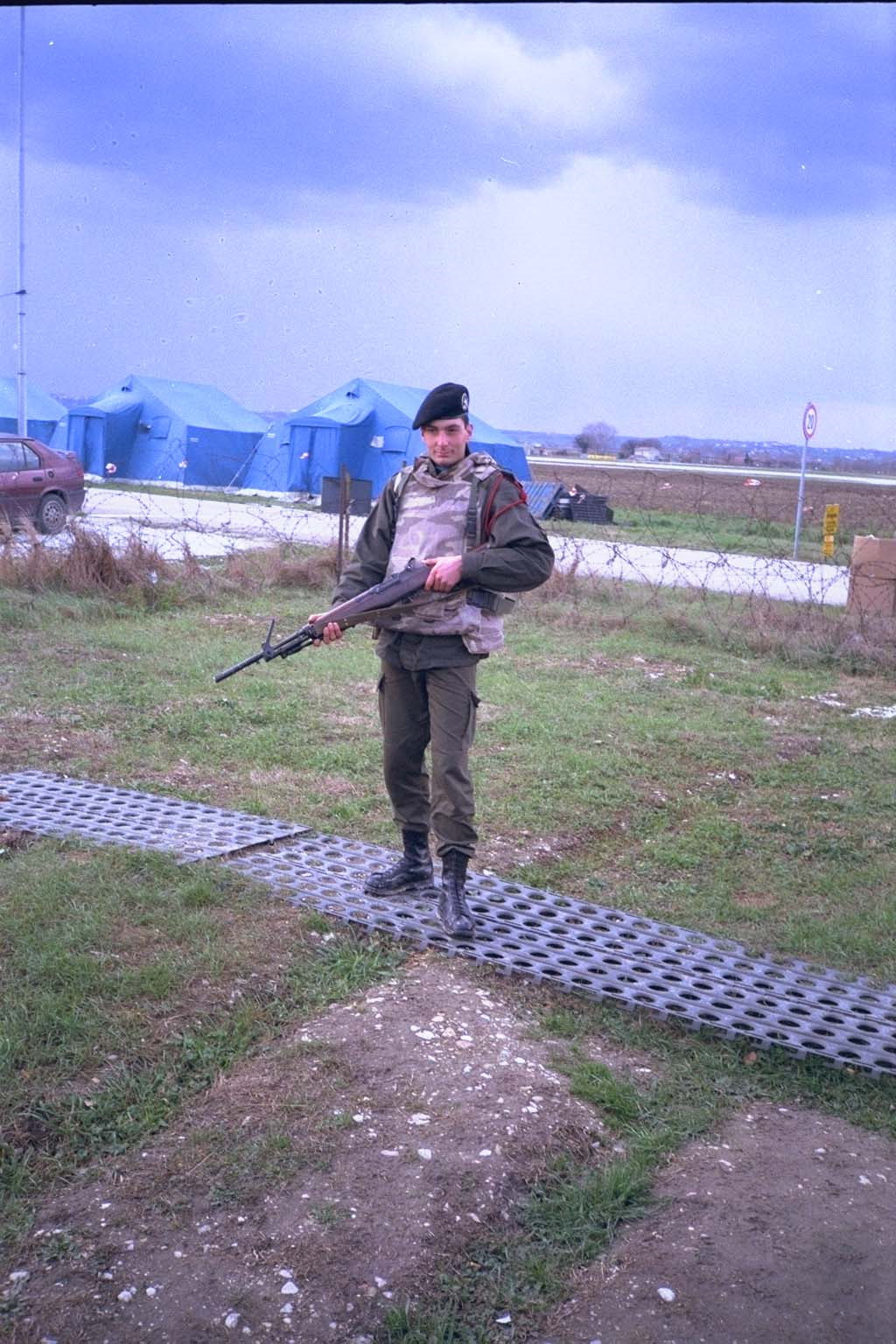 Graduato con Arma di dotazione individuale in zona Operativa anni 90/96 (foto Cocorocchio G.)